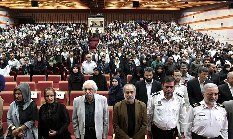 سالن همایش میلاد، محل دائمی نمایشگاه‌های بین‌المللی تهران، ۱۳۹۲